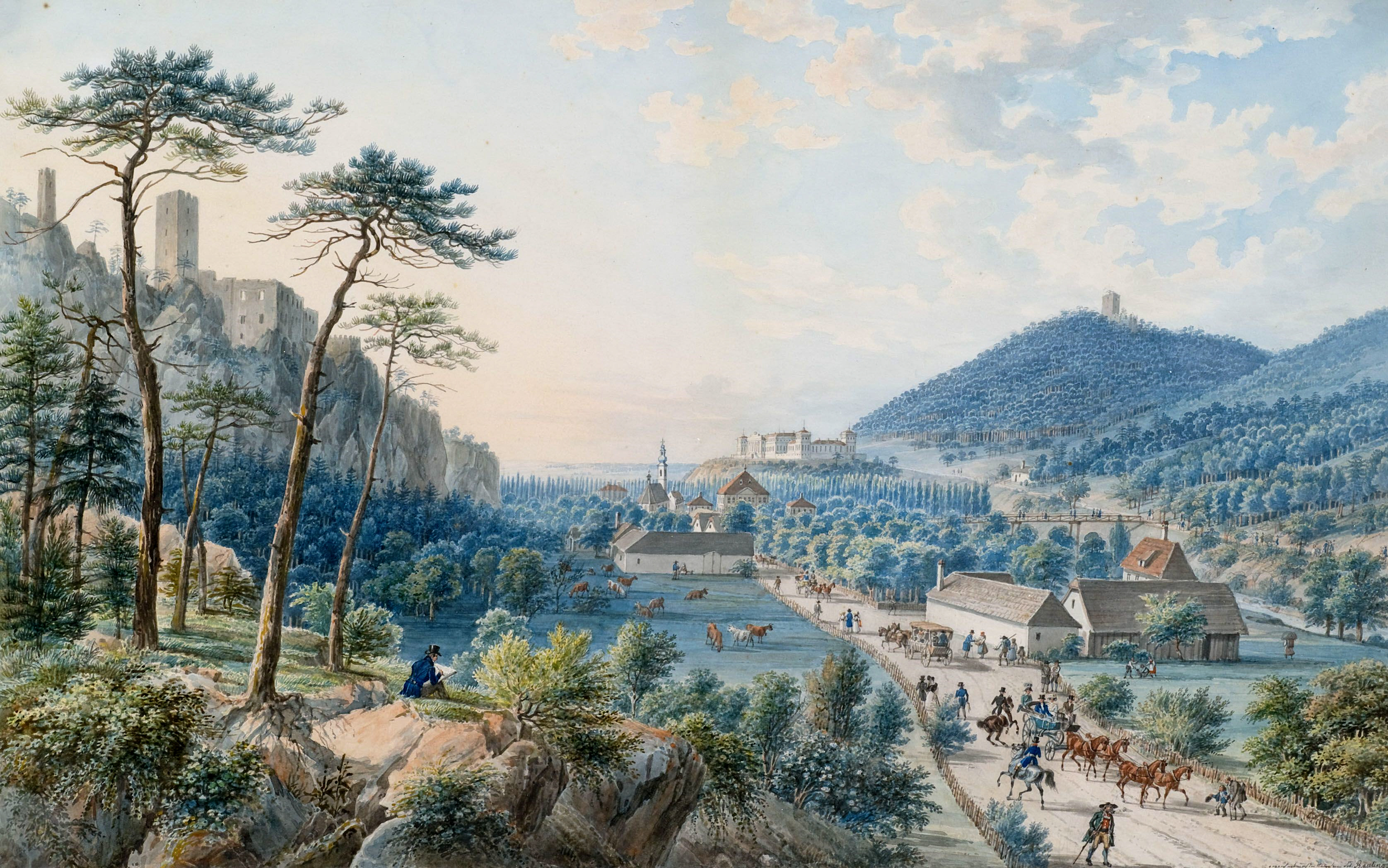 Blick auf Schloss Weilburg (Niederösterreich) zwischen den Burgen Rauheneck und Rauhenstein, im Vordergrund links wohl der Künstler selbst. Aquarell über Bleistift auf Papier, unten rechts signiert "gezeichnet nach der Natur von Tob. Raulino". 35 x 54 cm Verkauft für 13.720 Euro (mit Rahmen, inkl. Käufergebühr und Mehrwertsteuer) Dorotheum Wien 28. April 2014 Lot Nr. 246